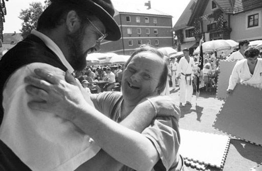 Walter auf einem Volksfest. Walter Kistler überlebte die Nazizeit, da er von seinen Eltern versteckt wurde. Walter, 53 (Down-Syndrom). Erschienen in: ZEITmagazin, Nr. 37, 6. September 1996, S. 8-15